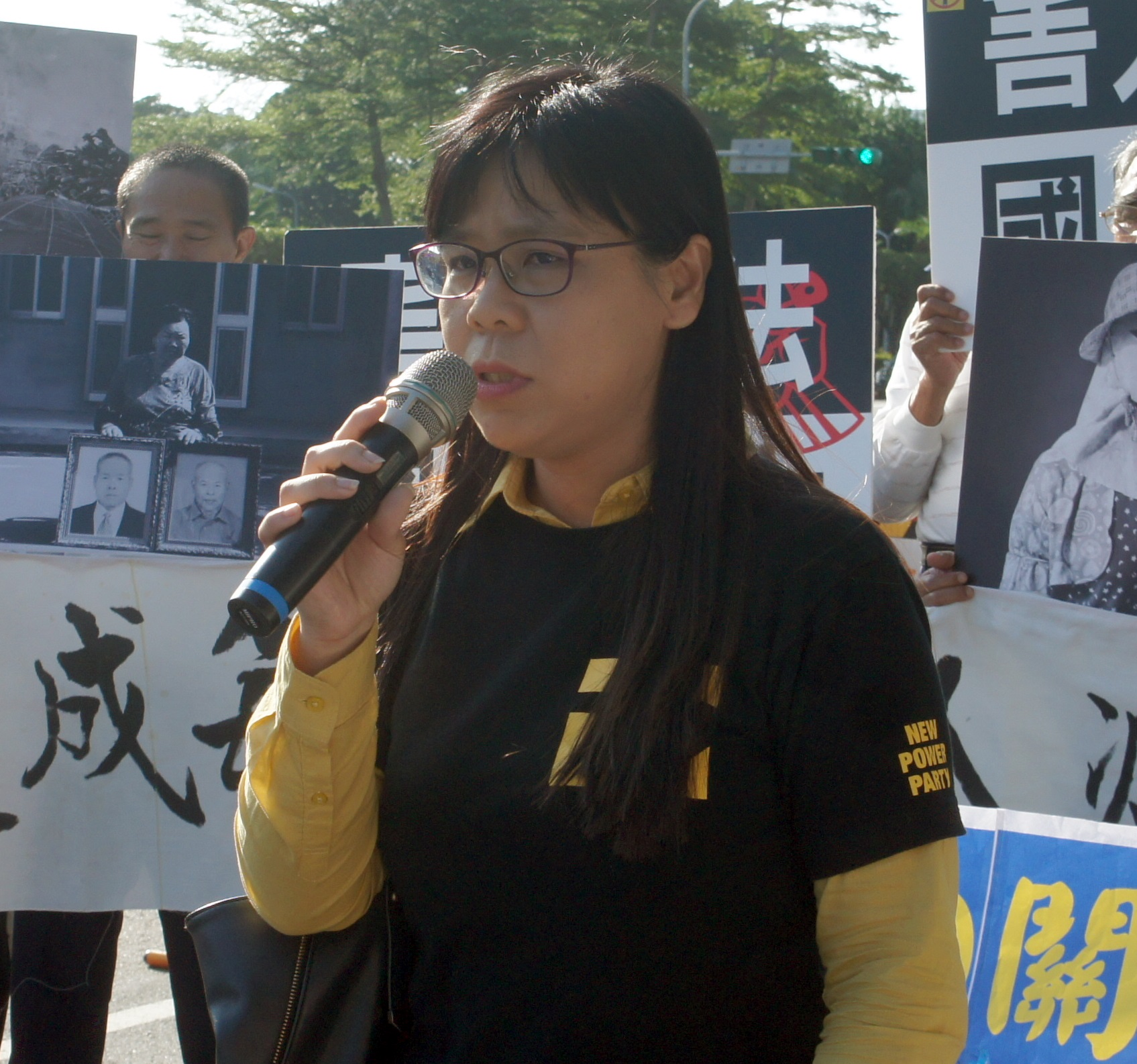 柯劭臻於反空污陳情中發言